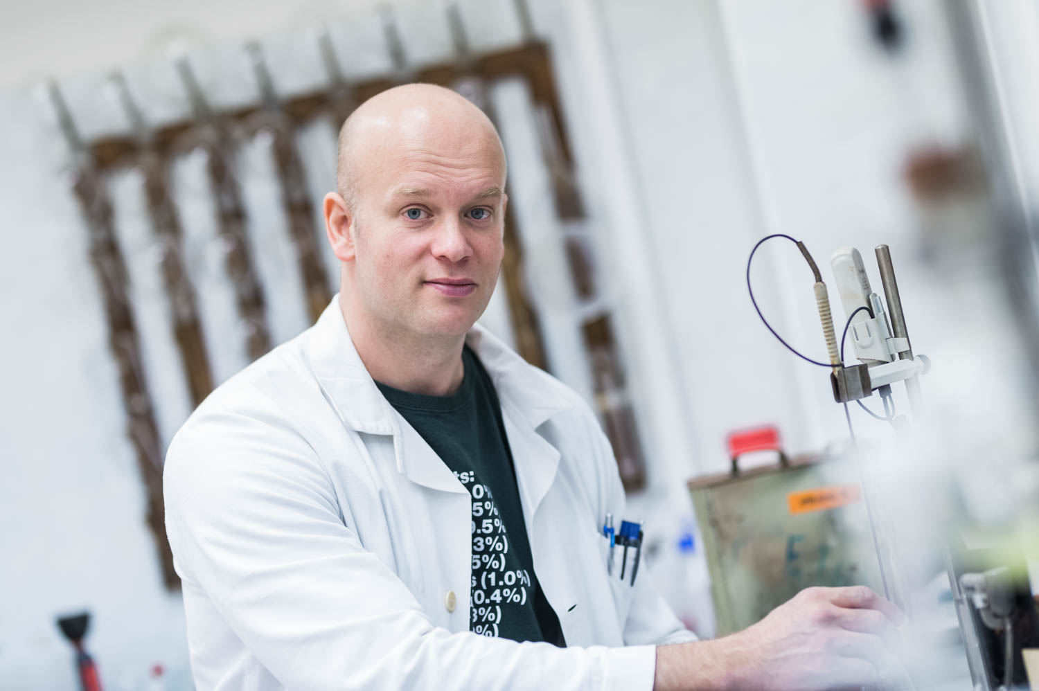 Michael Londesborough (* 1978 Londýn) je vědec britského původu, který působí na Ústavu anorganické chemie AV ČR, v.v.i.